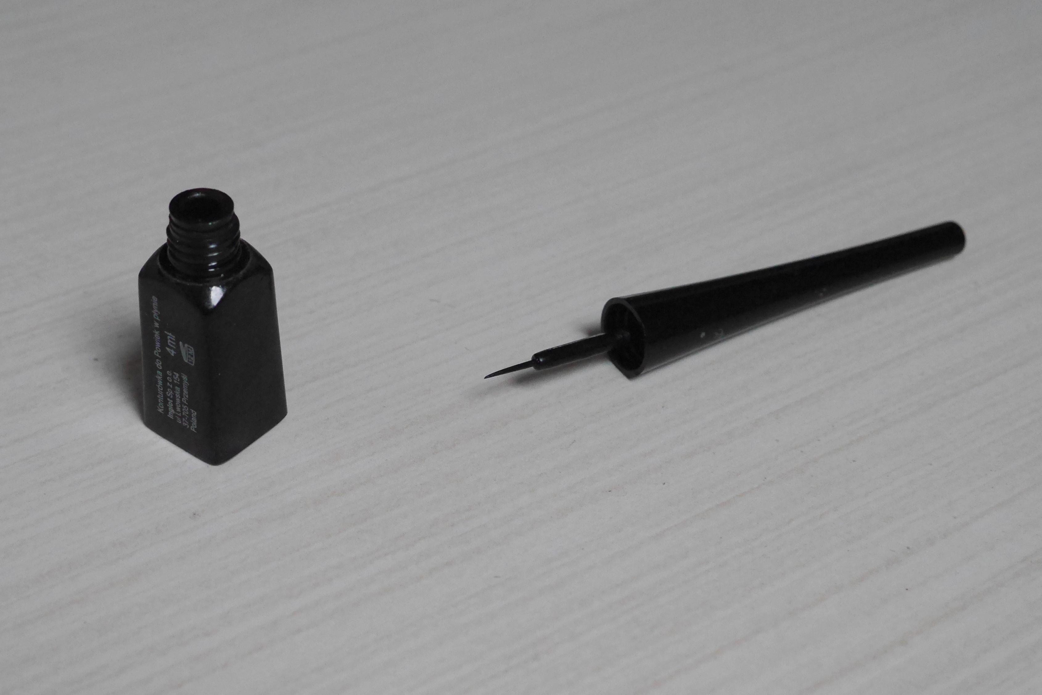 eye-liner w płynie